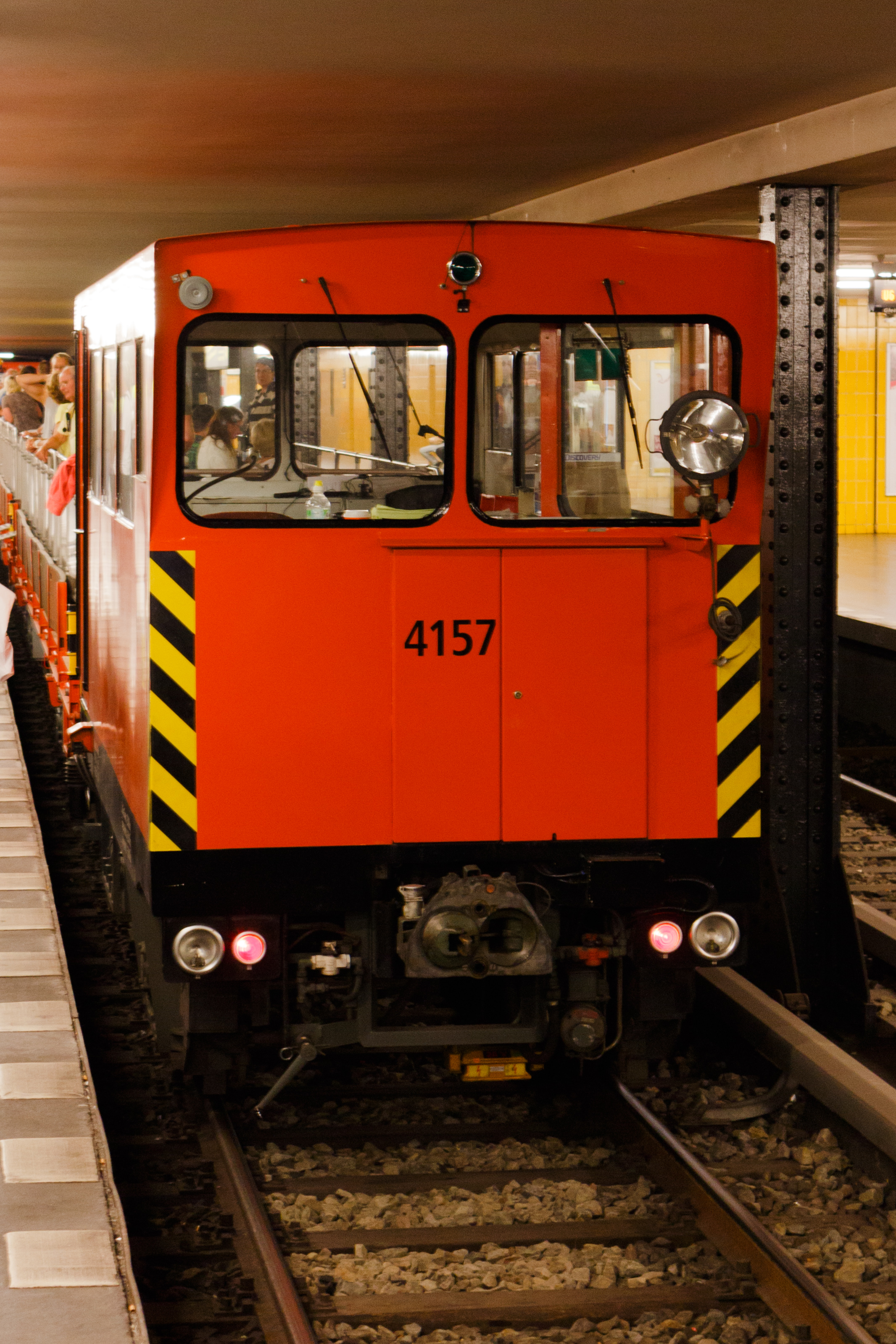 Arbeitstriebwagen BVG 4157